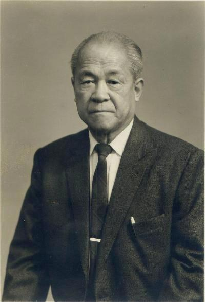 千千岩助太郎(1897-1991)個人照，1967攝。